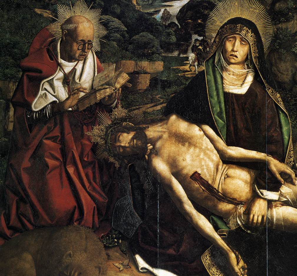 Esta obra, conocida como la Piedad del canónigo Desplá o del arcediano Lluís Desplà, fue pintada para la catedral de Barcelona por encargo del arcediano Lluís Desplá en 1490 y se conserva en el Museo catedralicio de Barcelona, (España).